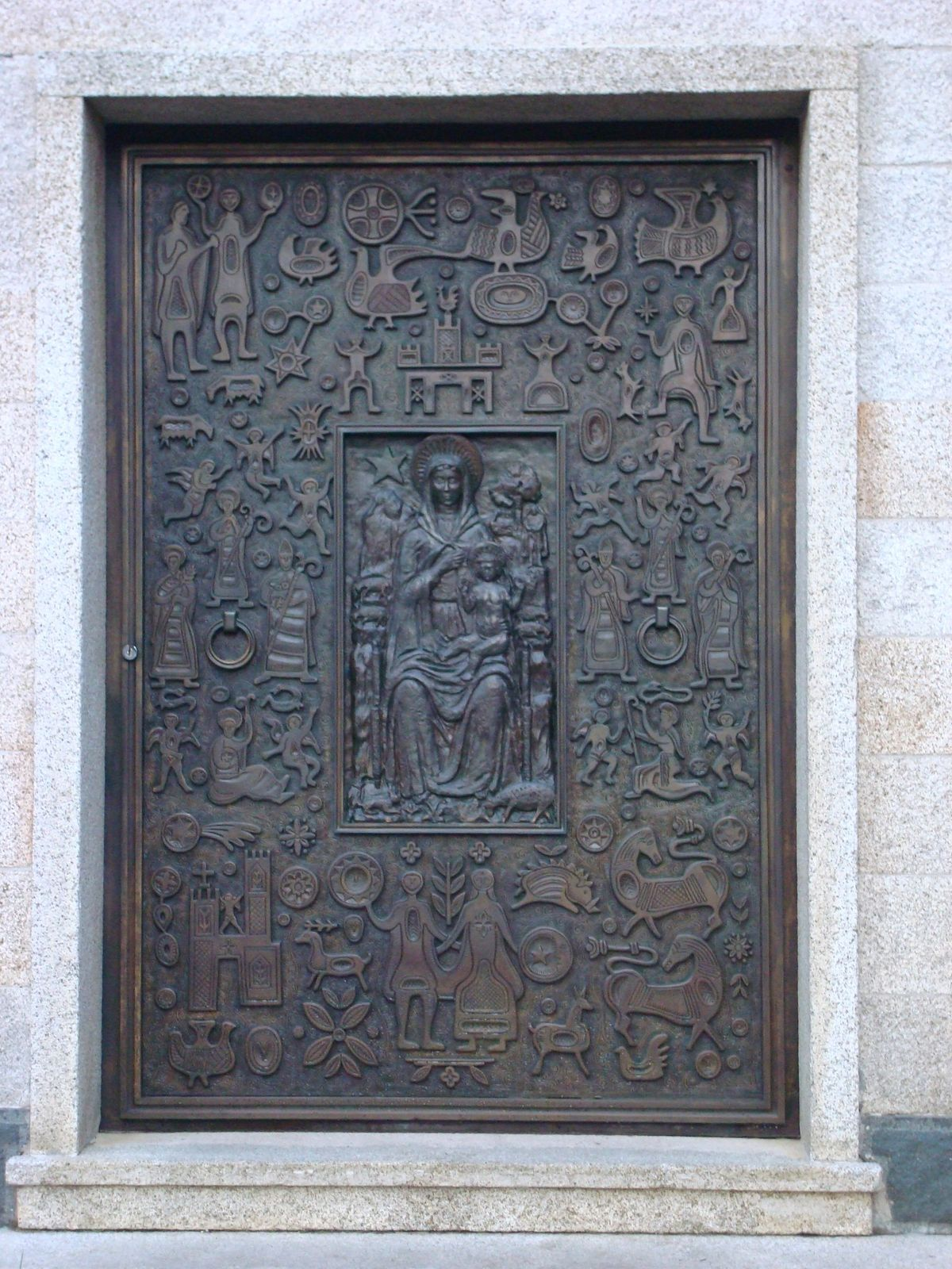 Portale in bronzo, opera dello scultore Eugenio Tavolara, nella chiesetta della Madonna della Solitudine a Nuoro.